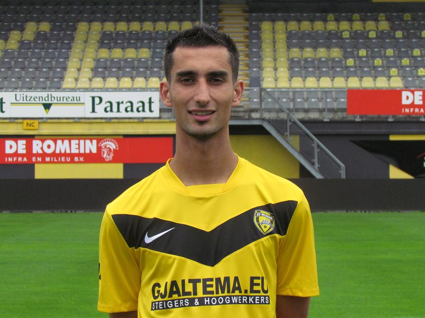 Voetbalspeler voor Veendam